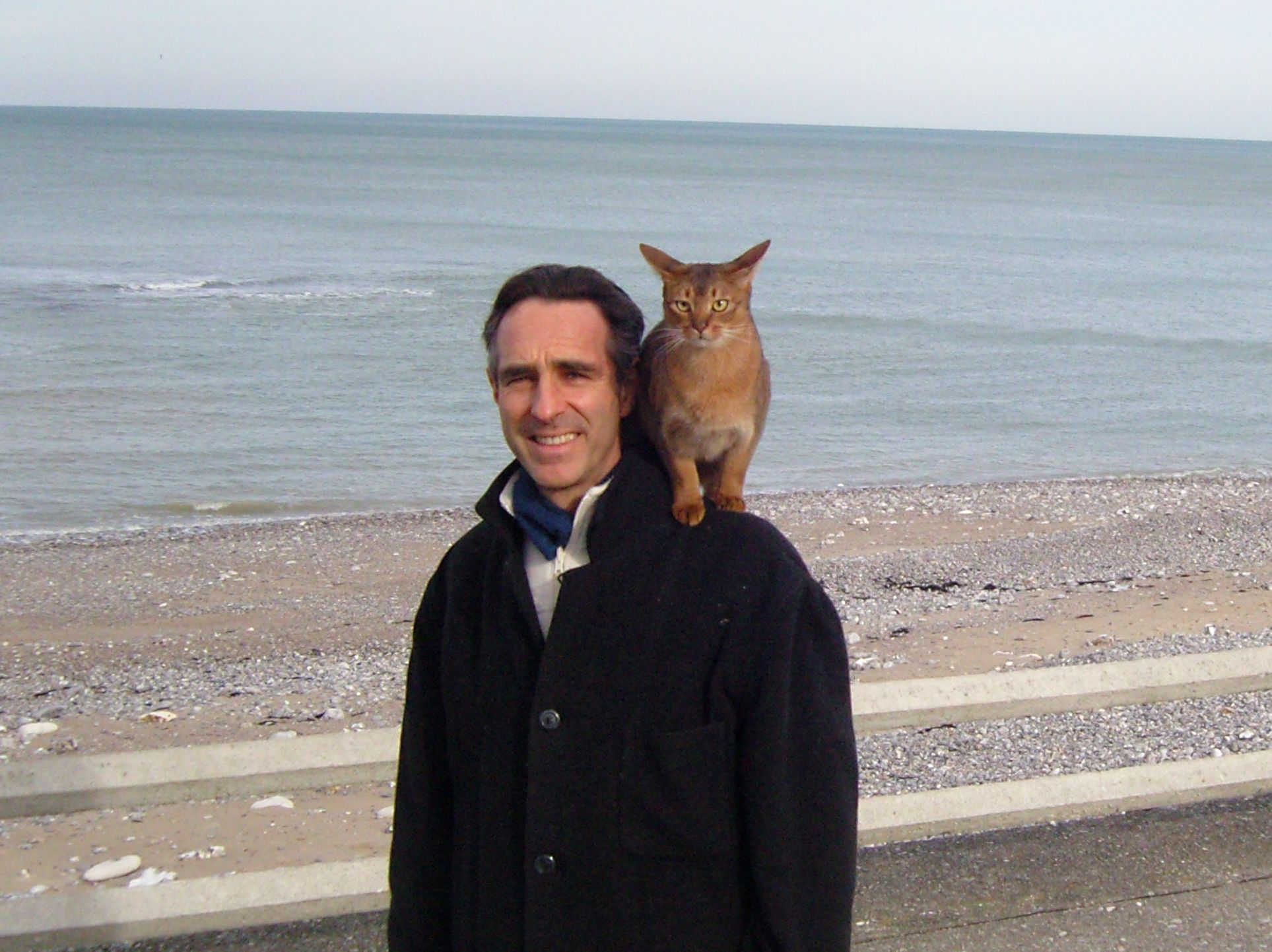 David Servan-Schreiber se promenant sur la digue de Veulettes-sur-Mer avec son chat "Titus". 2006. photo: Franklin Servan-Schreiber